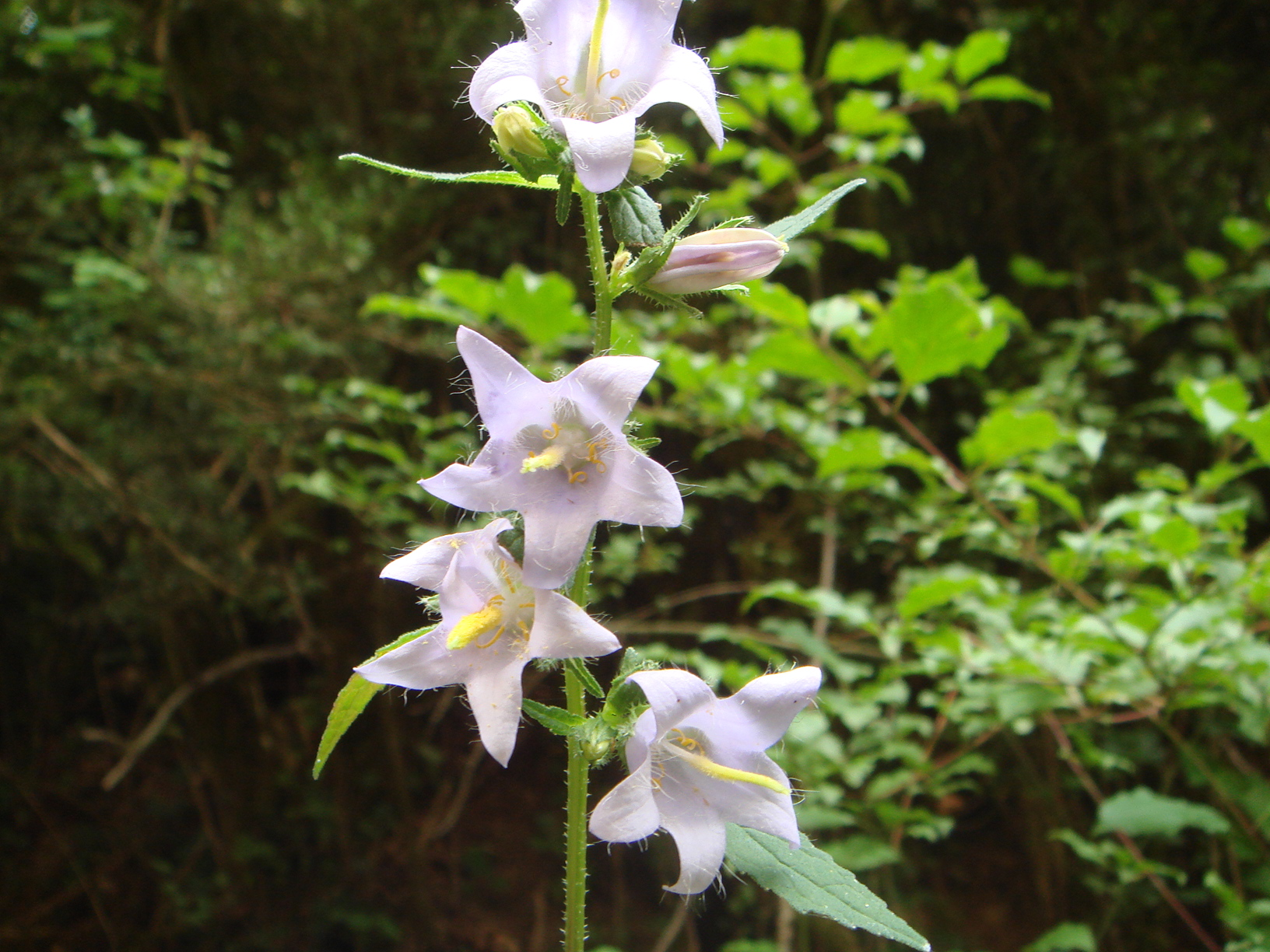 Campanula trachelium, Cañón de Añisclo, Pirineos (Huesca), España